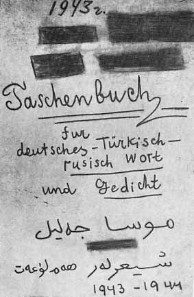 Musa Cälil's Moabit Notebooks